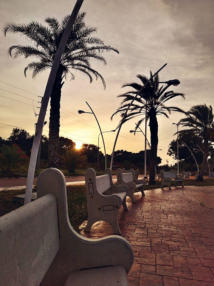 Atardecer en la plaza de San Tomé, donde generalmente se reúnen residentes, estudiantes y trabajadores de la zona.